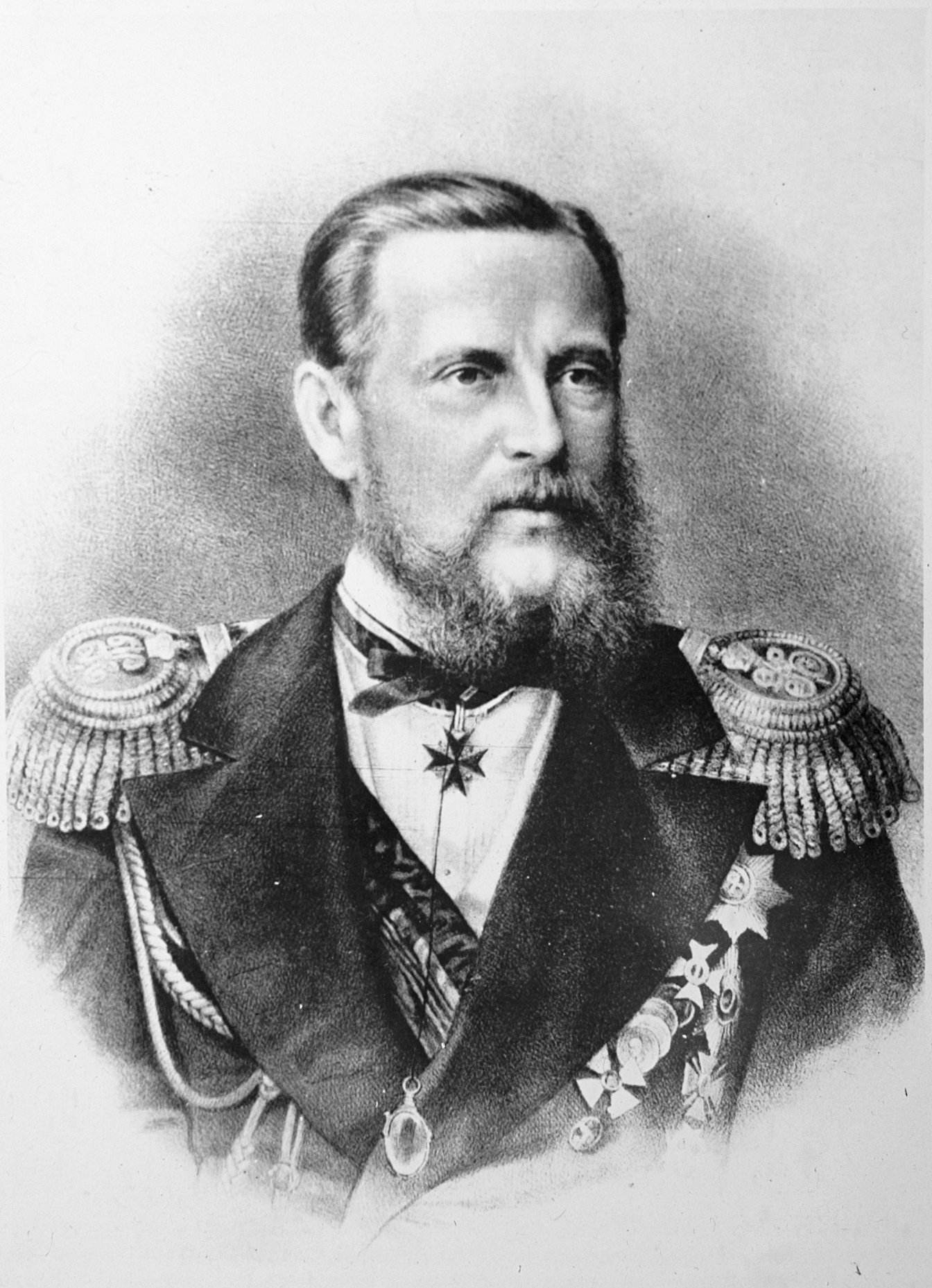 Великий князь Константин Николаевич (1827-1892)